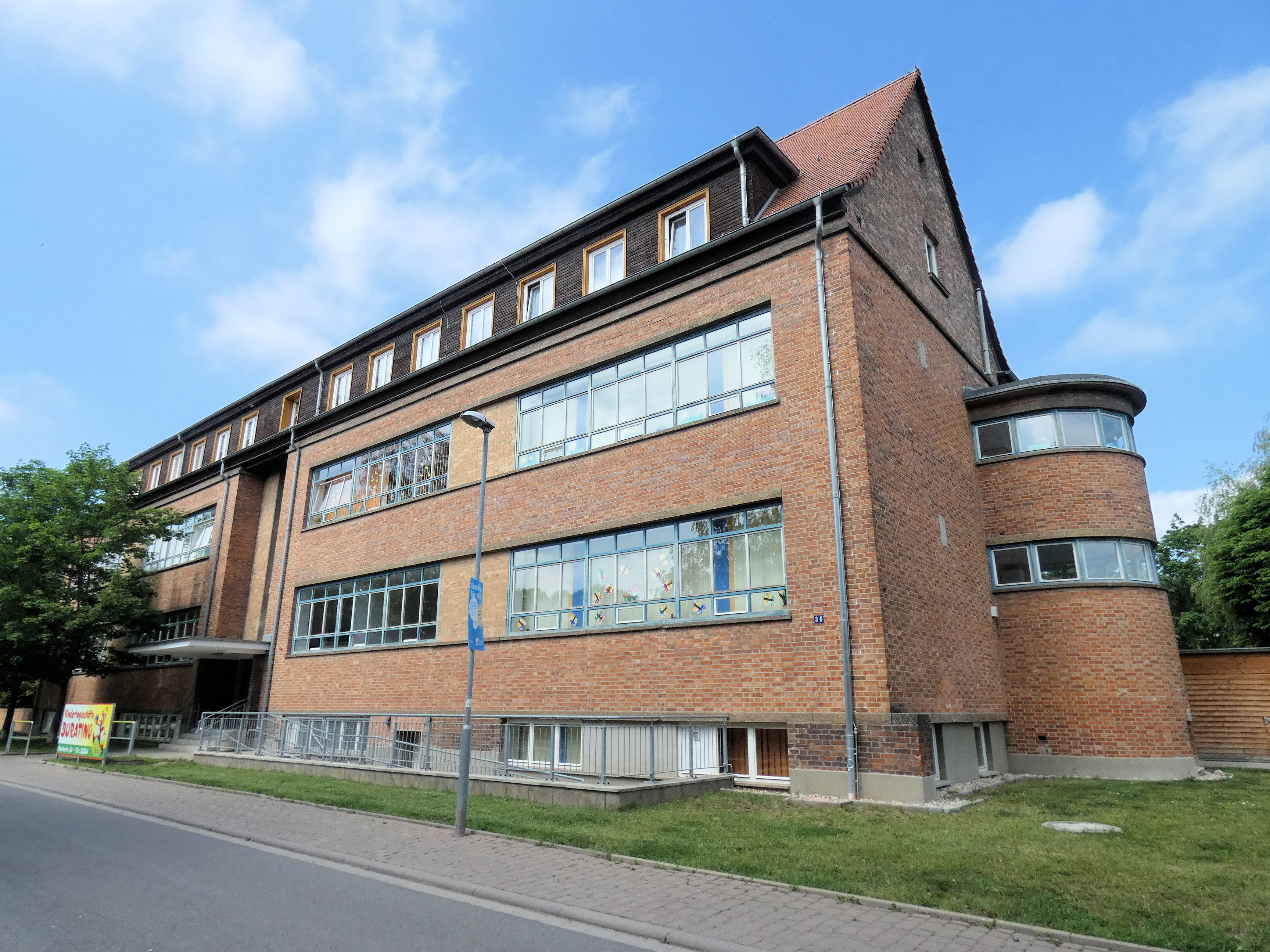 1929 erbaute Schule, ehemalige Pestlozzischule, ab 1959 Polytechnische Oberschule (POS), seit 1986 Kita "Buratino", Maerkerstraße, Teutschenthal Teil der sogen. Siedlung "Neu-Jerusalem", erb. 1927-1929